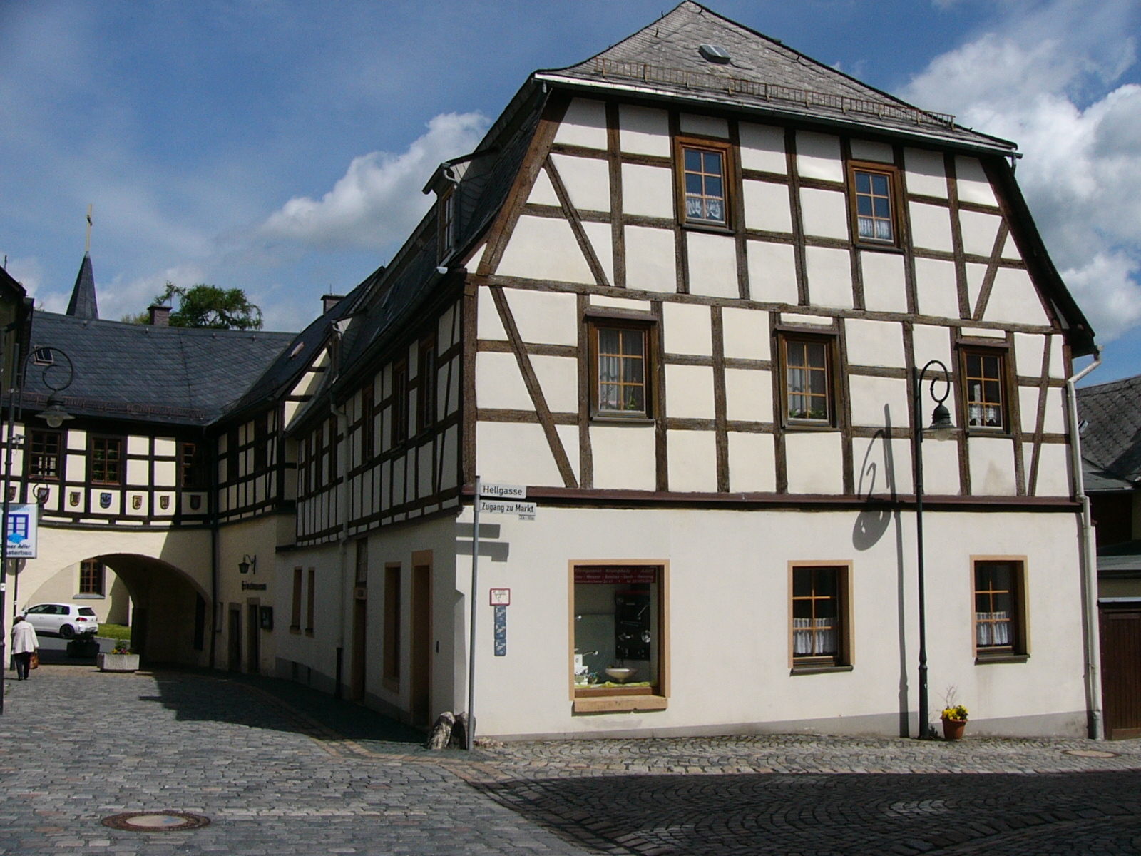 Adorf, Freiberger Tor